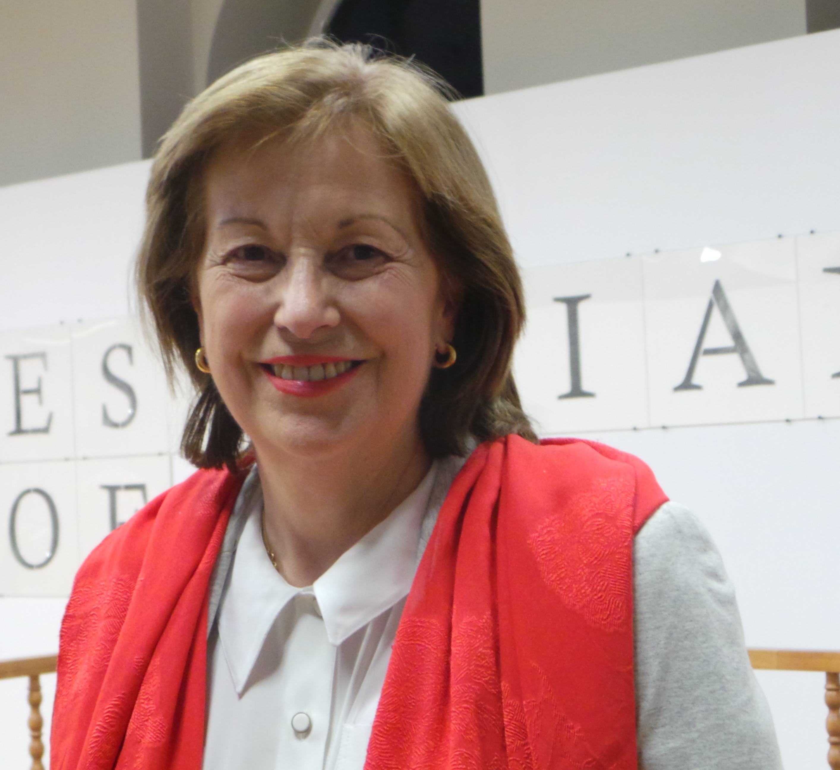 Carmen Romero en la Casa Árabe de Madrid